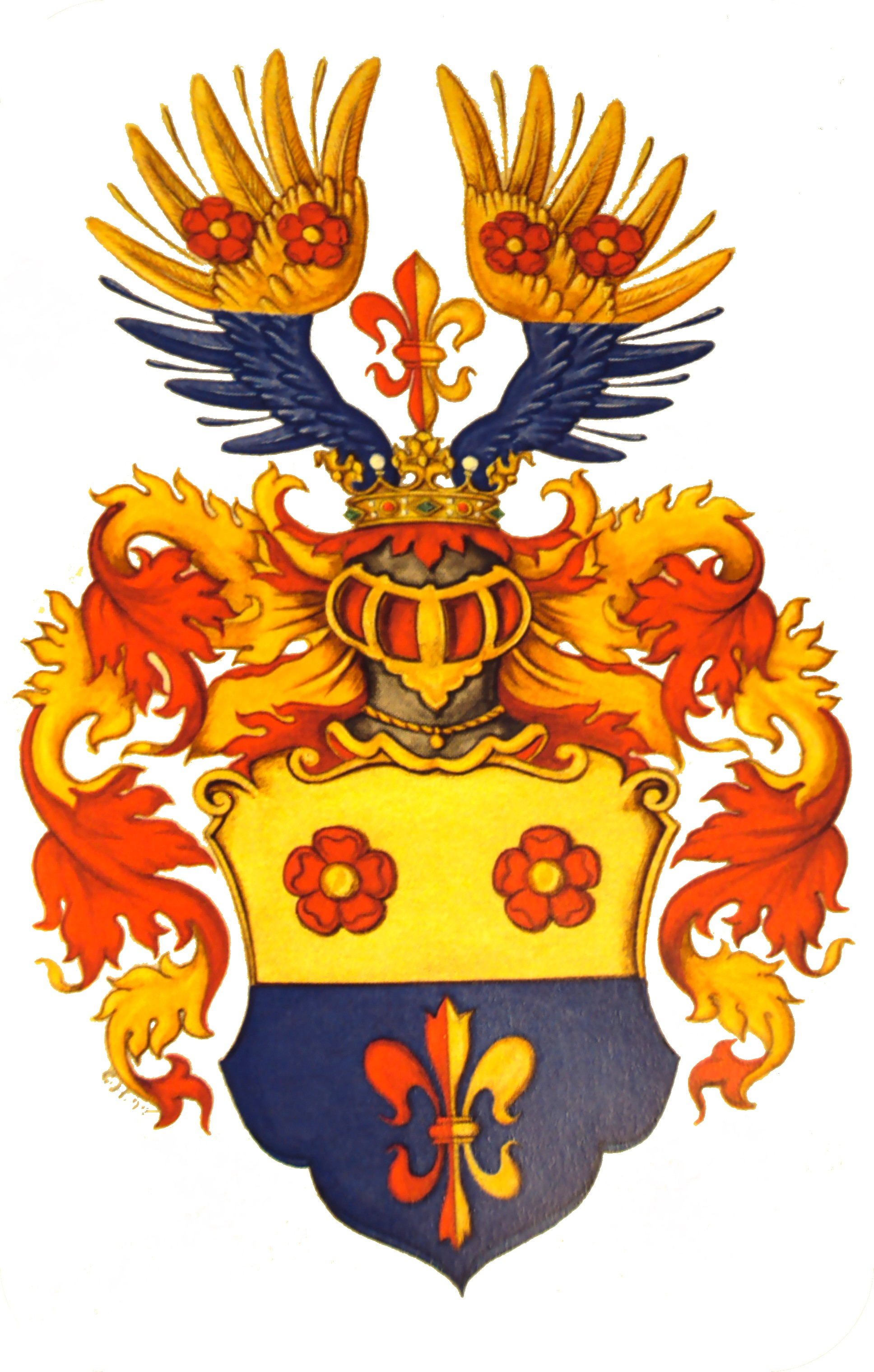 Armoiries de la famille de Gail reçues le 15 Avril 1532. Héraldique et droit d'usage et de reproduction exclusif reservé aux membres de ladite famille en vertu du code civil de la République Française